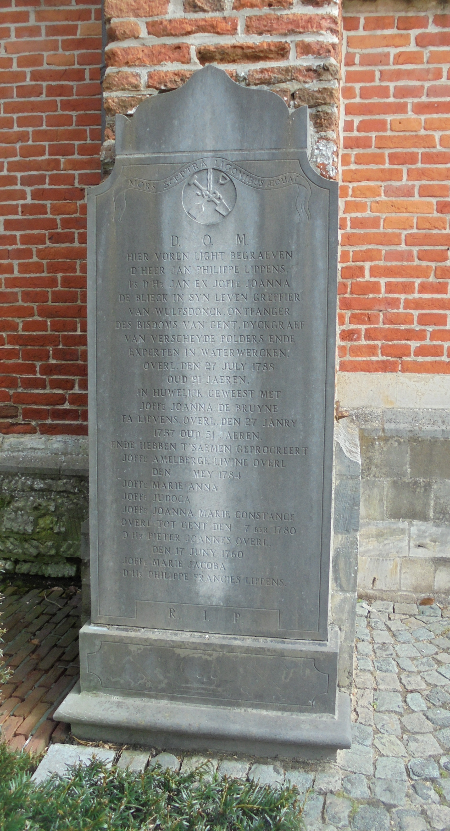 Grafmonument Jean Philippe Lippens 1698-1788 - links van de ingang van de Sint-Antonius Abtkerk - Bevrijdersstraat - Moerbeke - Oost-Vlaanderen - België